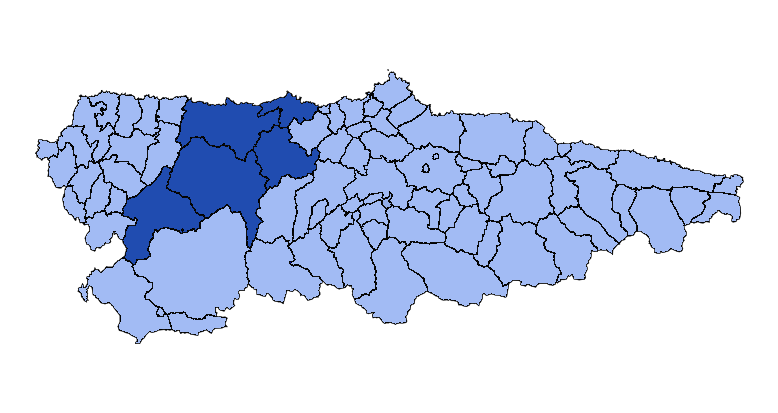 Concejos que forman la mancomunidad asturiana de la Comarca Vaqueira